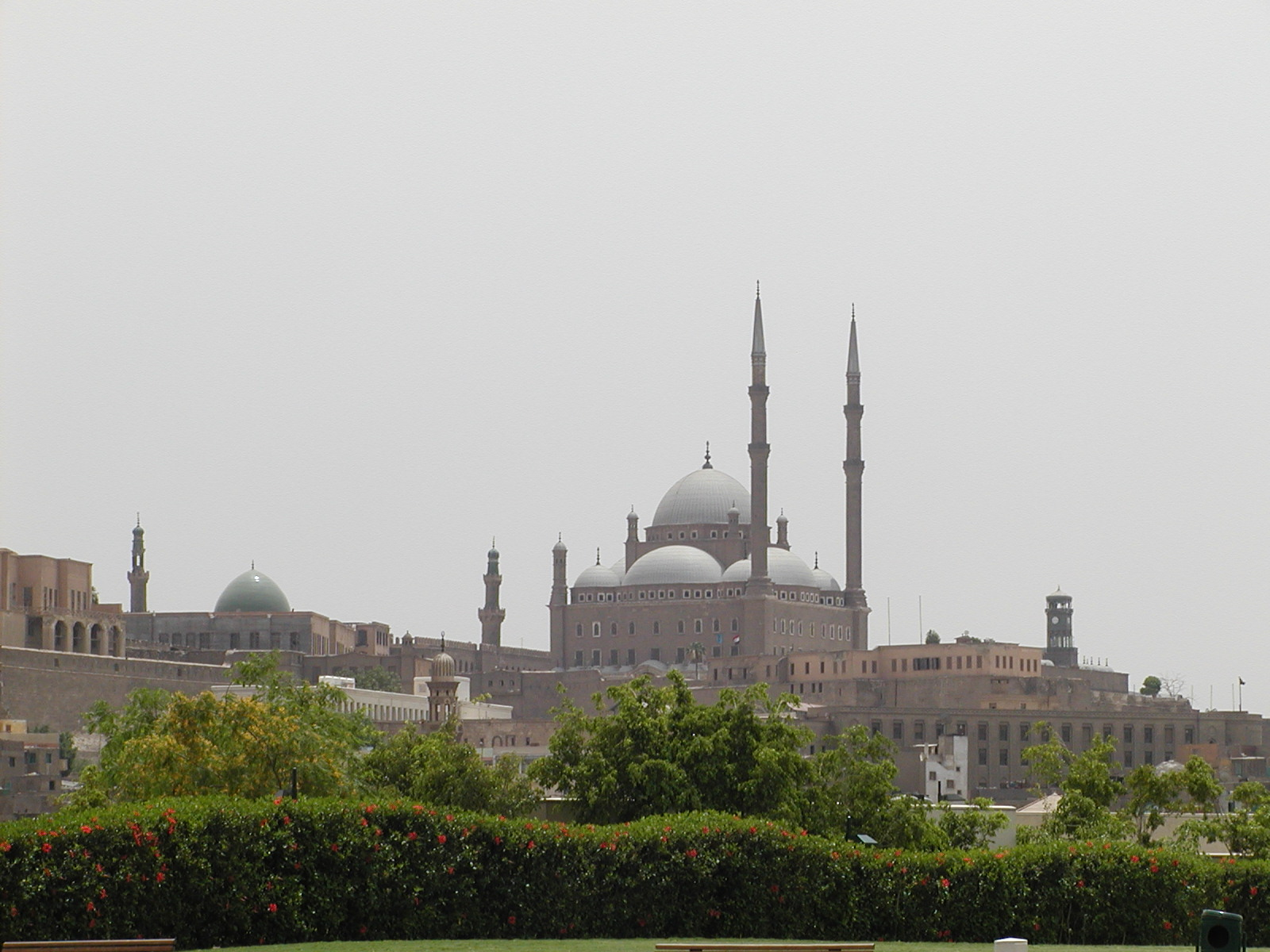 La Citadelle de Saladin vue depuis depuis le Parc Al-Azhar, Le Caire, Égypte.